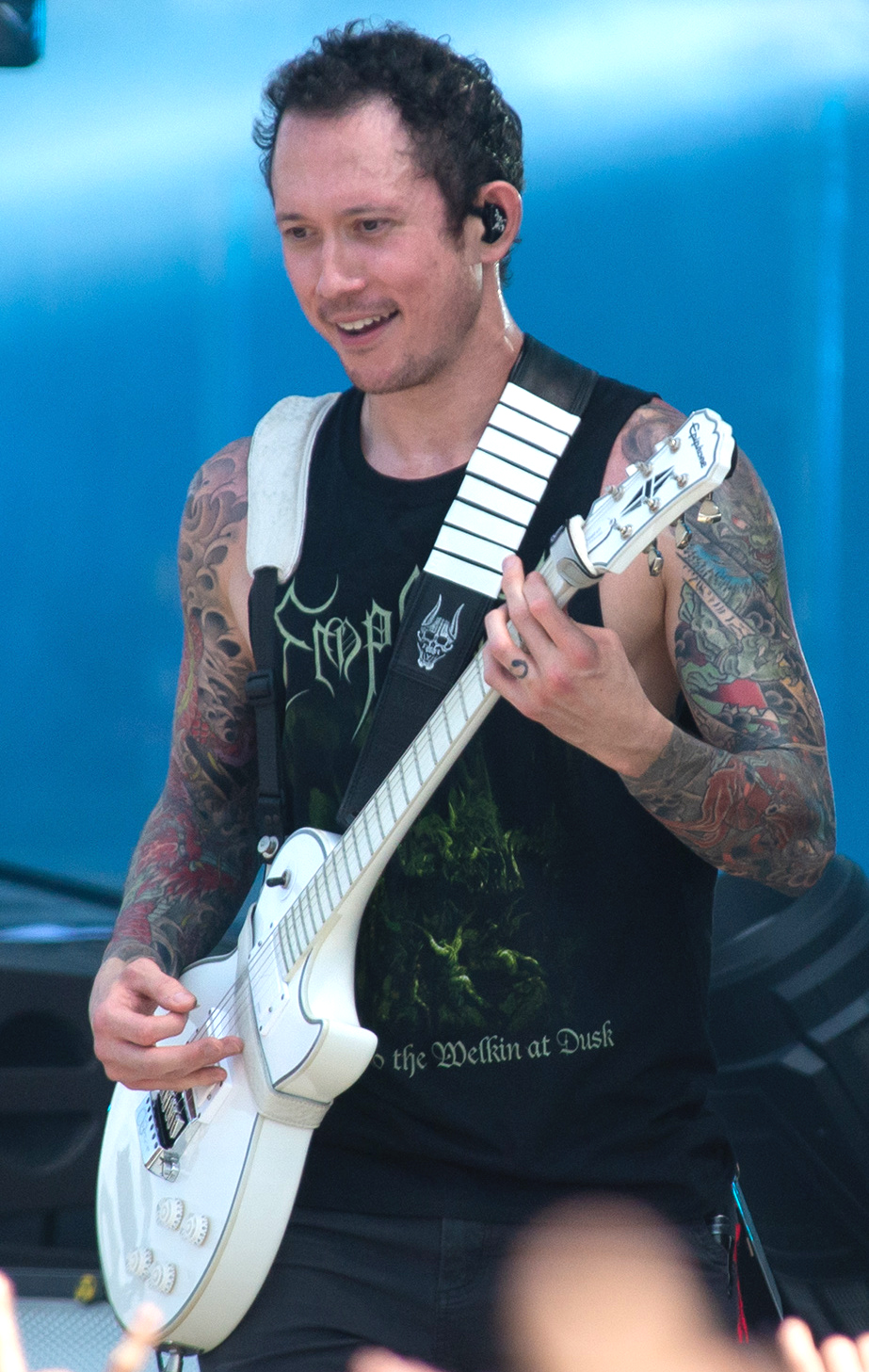 Concert du groupe américain Trivium au Hellfest 2019.